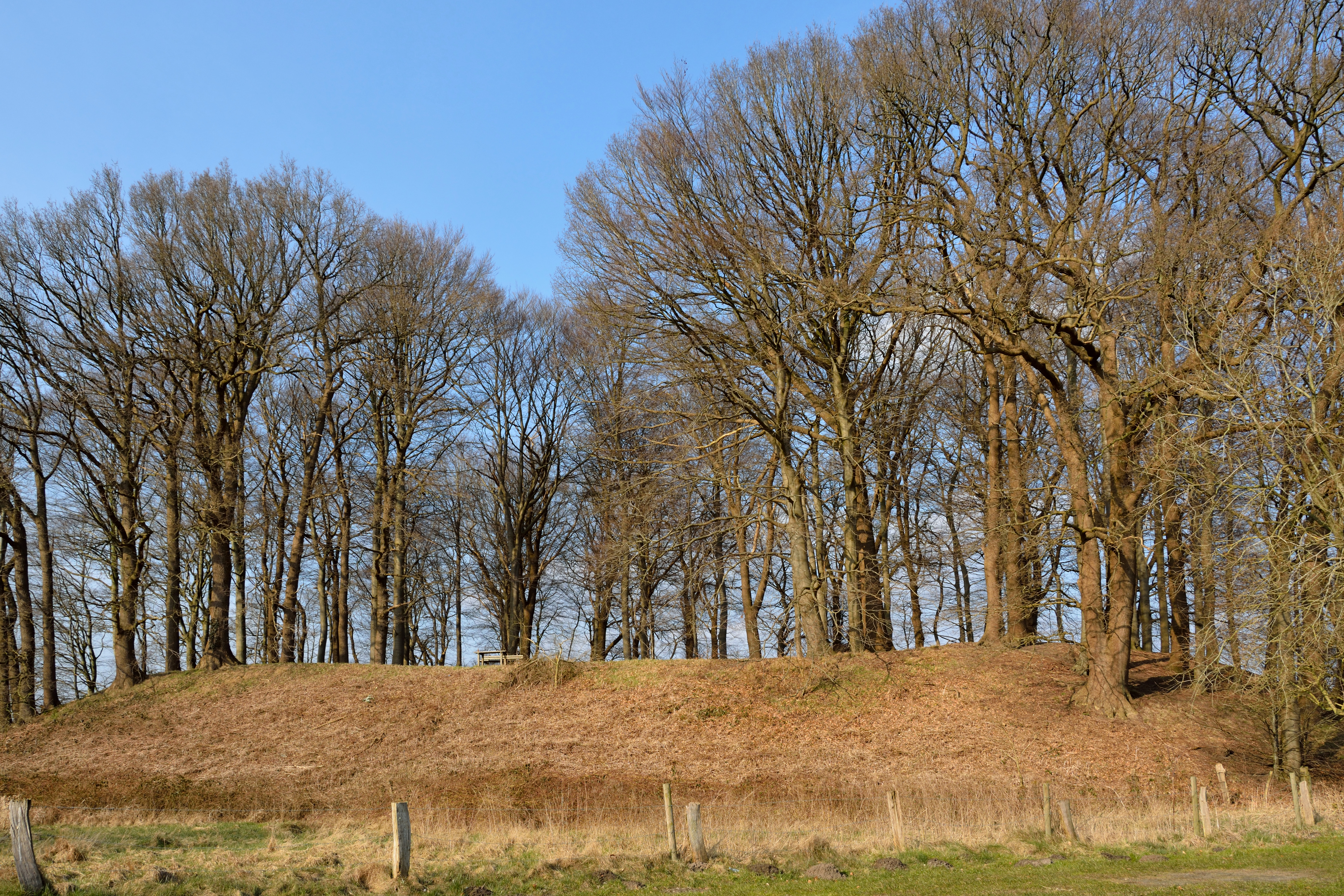 Der Wallberg in Willenscharen ist eine alte sächsische Ringwallburg. Blick von aussen auf den Wallberg.